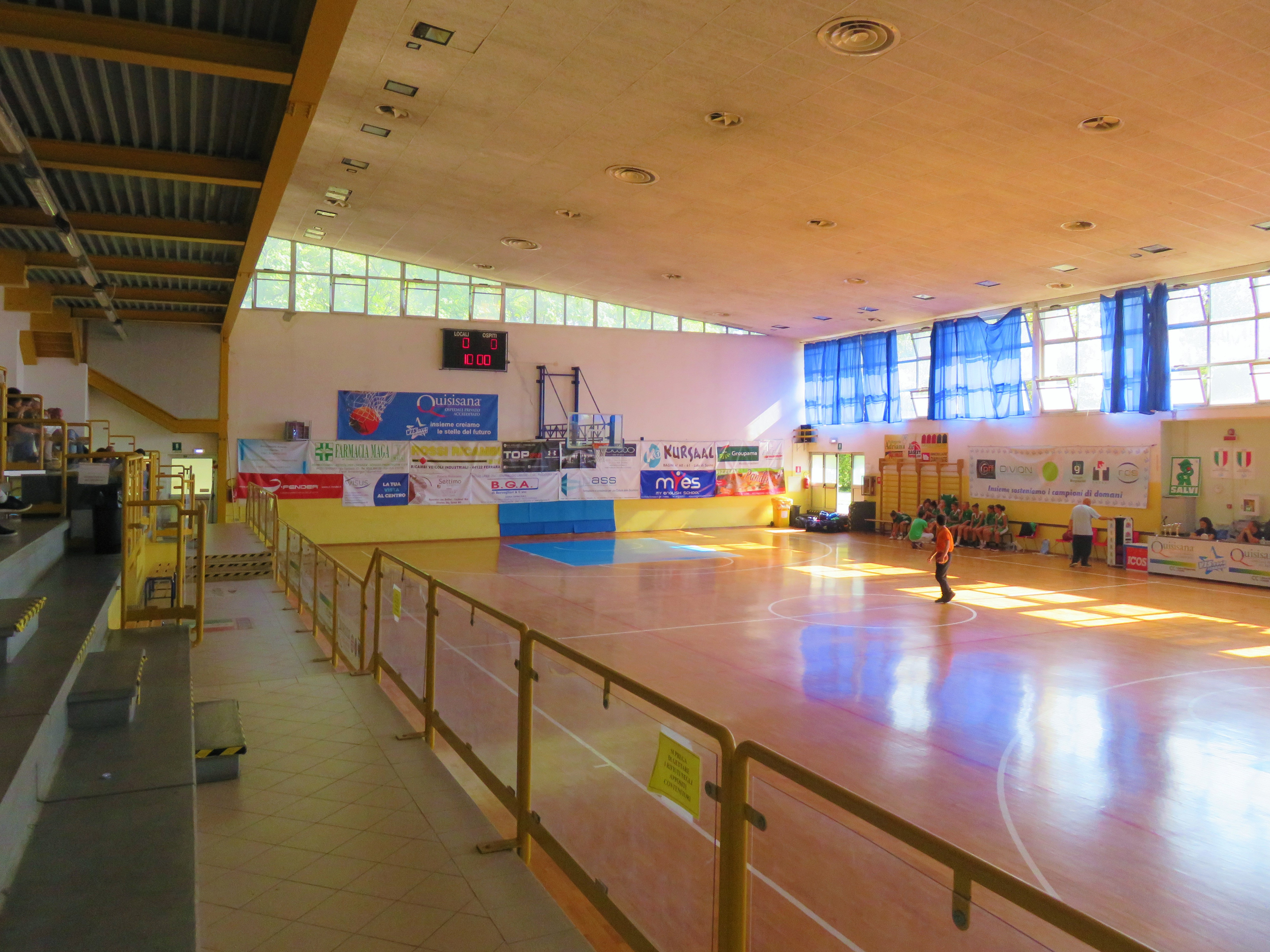 Palapalestre "John Caneparo", interno